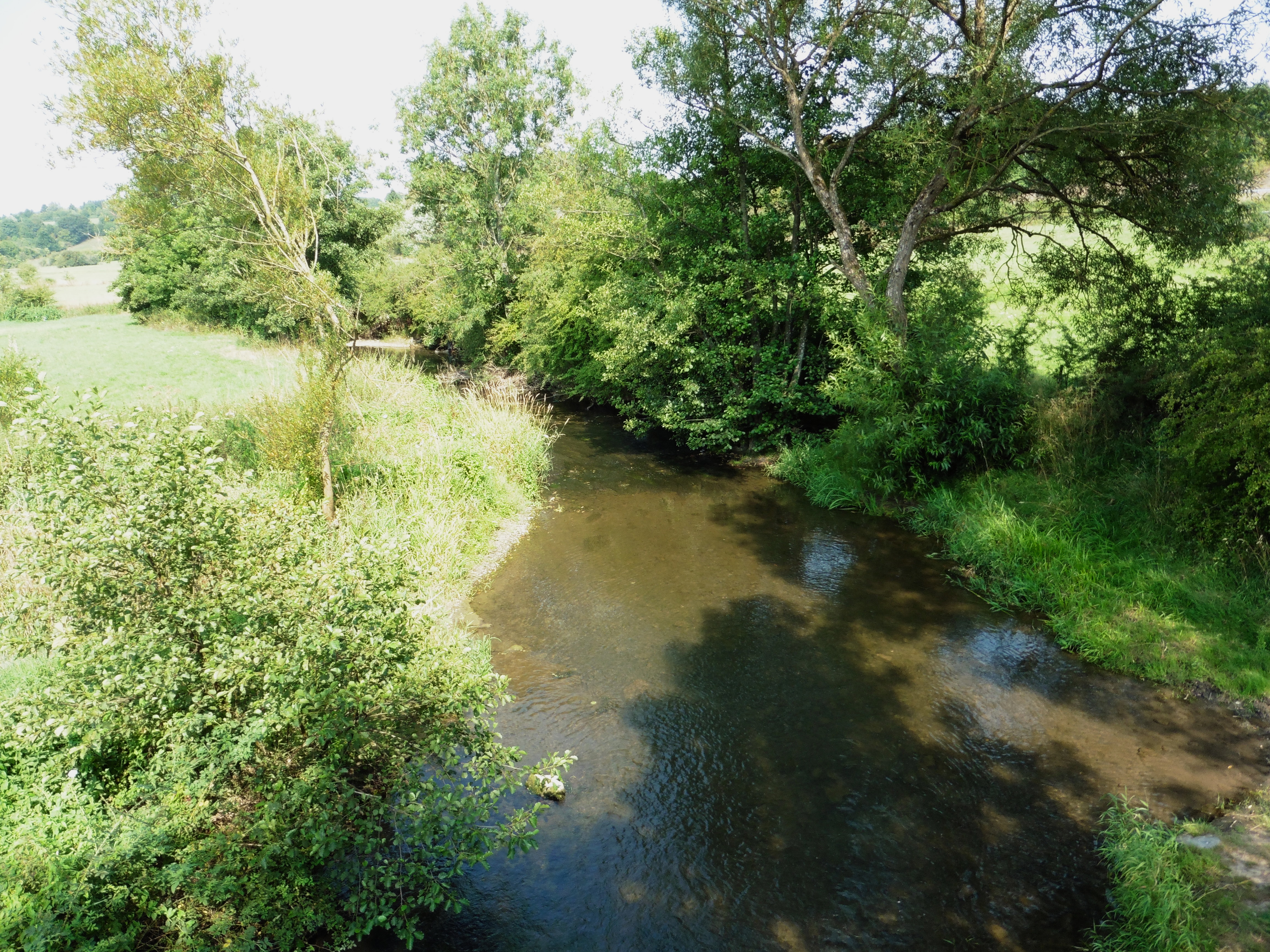 L’Helpe Majeure à Eppe-Sauvage Nord.- France.